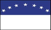 Bandeira do Município de Céu Azul - Brasil